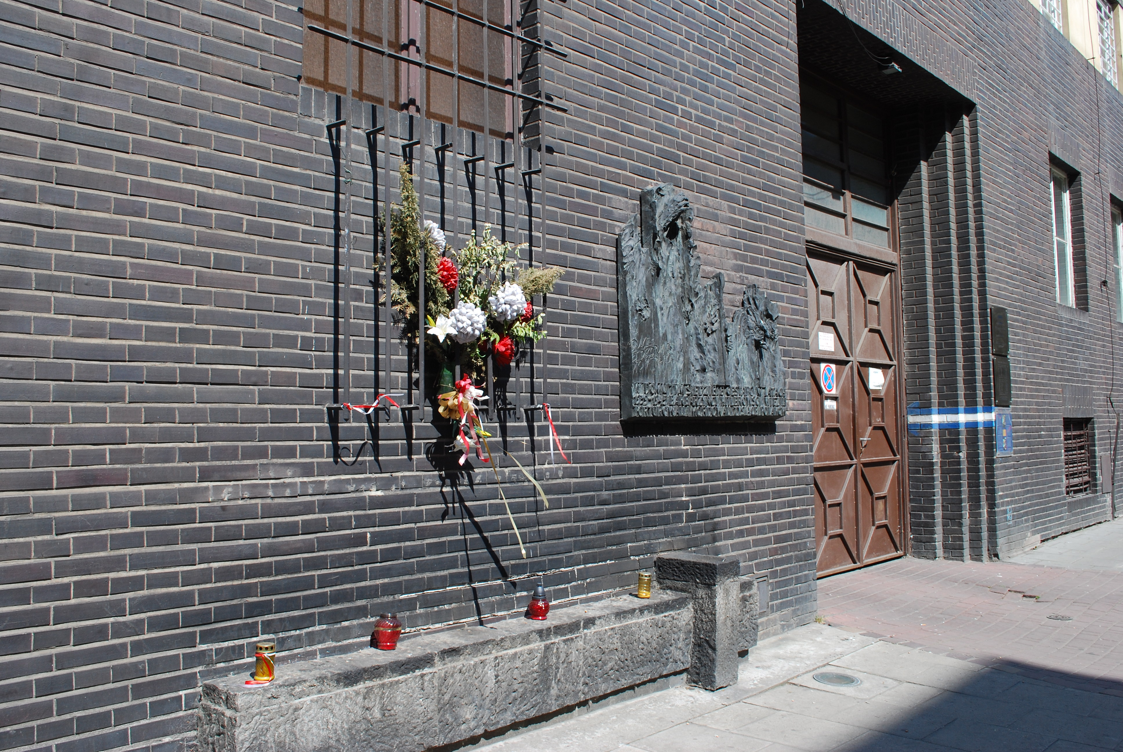 Dom Śląski - oddział Muzeum Historycznego Miasta Krakowa, była katownia Gestapo